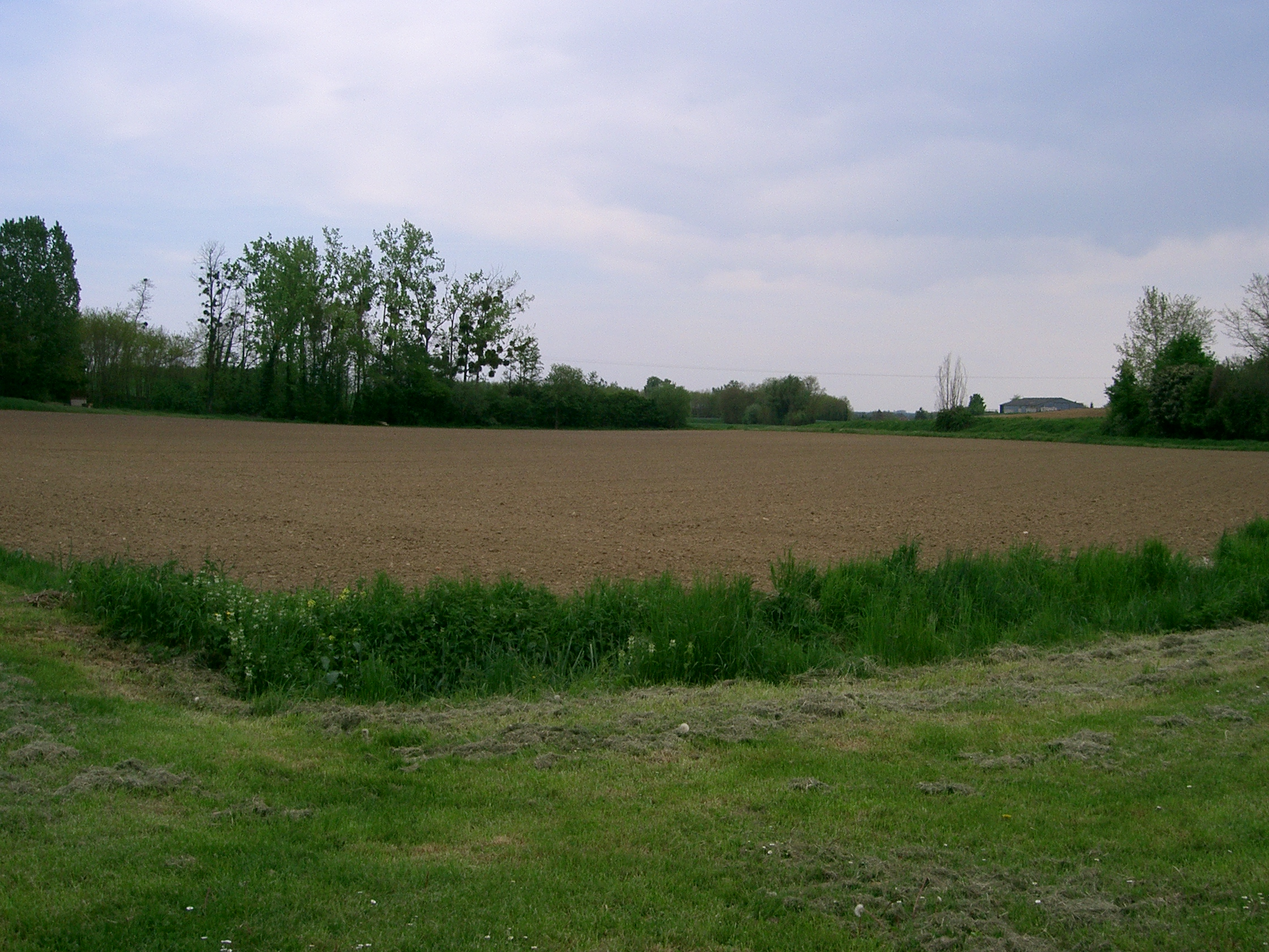 Emplacement de l'abbaye de Molaise détruite (Ecuelles - Saône-et-Loire , France). On devine en haut à gauche la chapelle Saint Louis édifiée au XIXe siècle en souvenir.